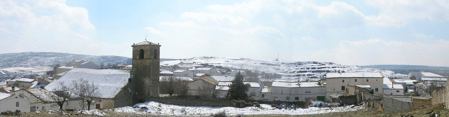 Panoramica de la Población actual de Valeria